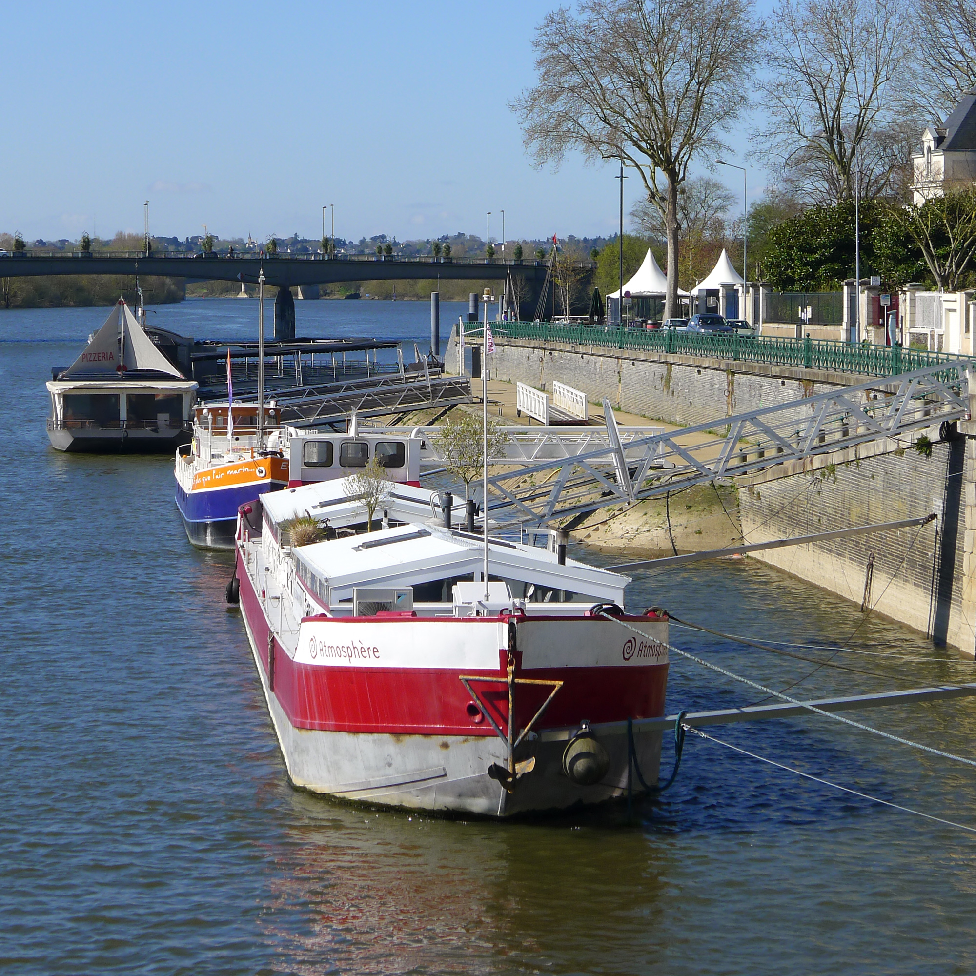 Quai des Carmes dans le quartier de la Doutre - Angers (France)